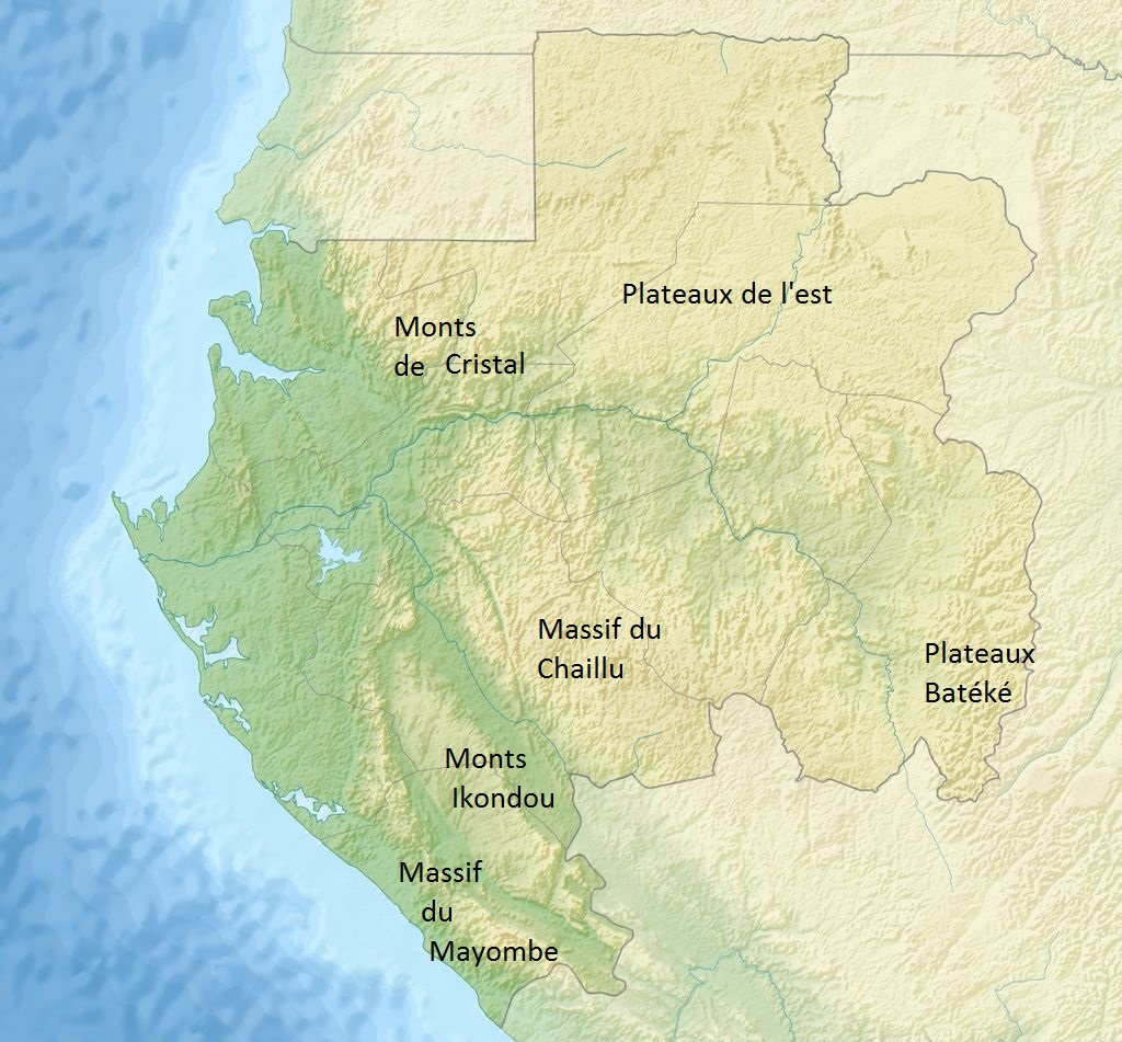 Emplacements des massifs montagneux du Gabon d'après "Gabon relief location map.jpg"